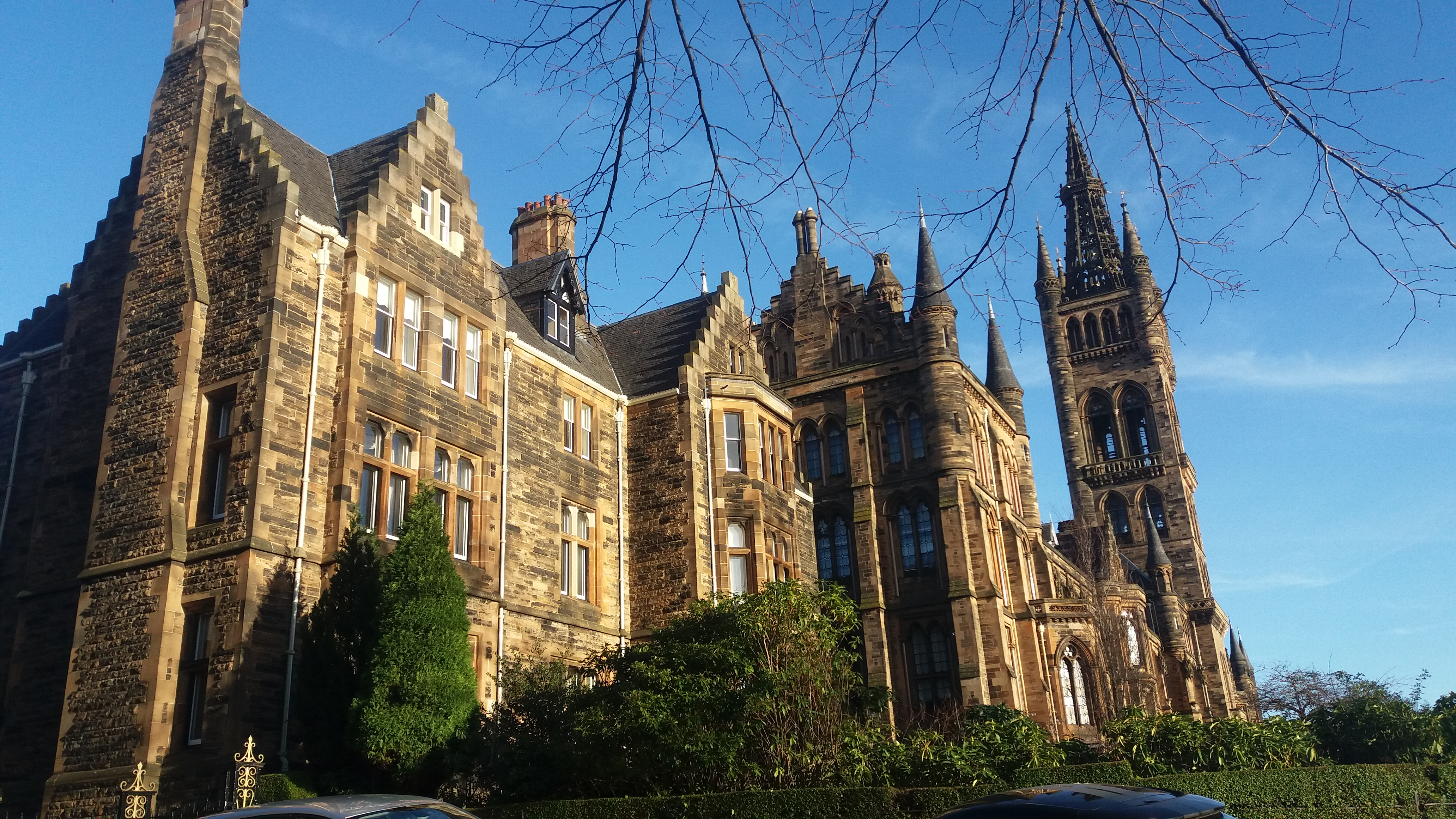 Blick von Nordosten